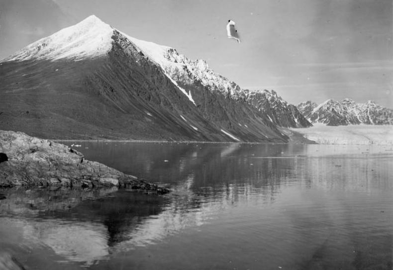 Polarfahrt mit dem Dampfer "München".- Gletscher vom Möllerbay bei der Ausfahrt 17. Juli - 12. August 1925